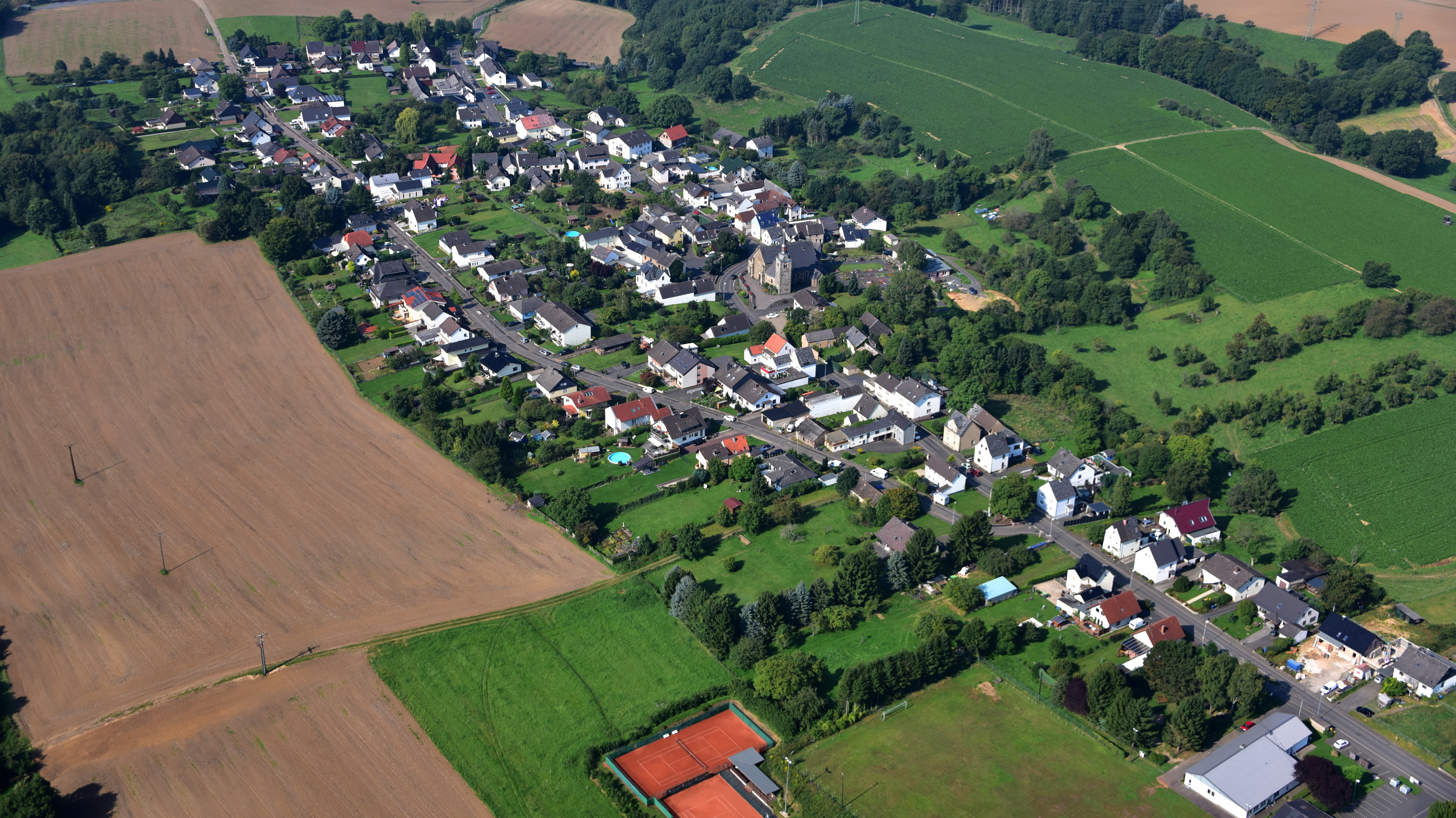 Kasbach-Ohlenberg, Ortsteil Ohlenberg, Luftaufnahme (2017)